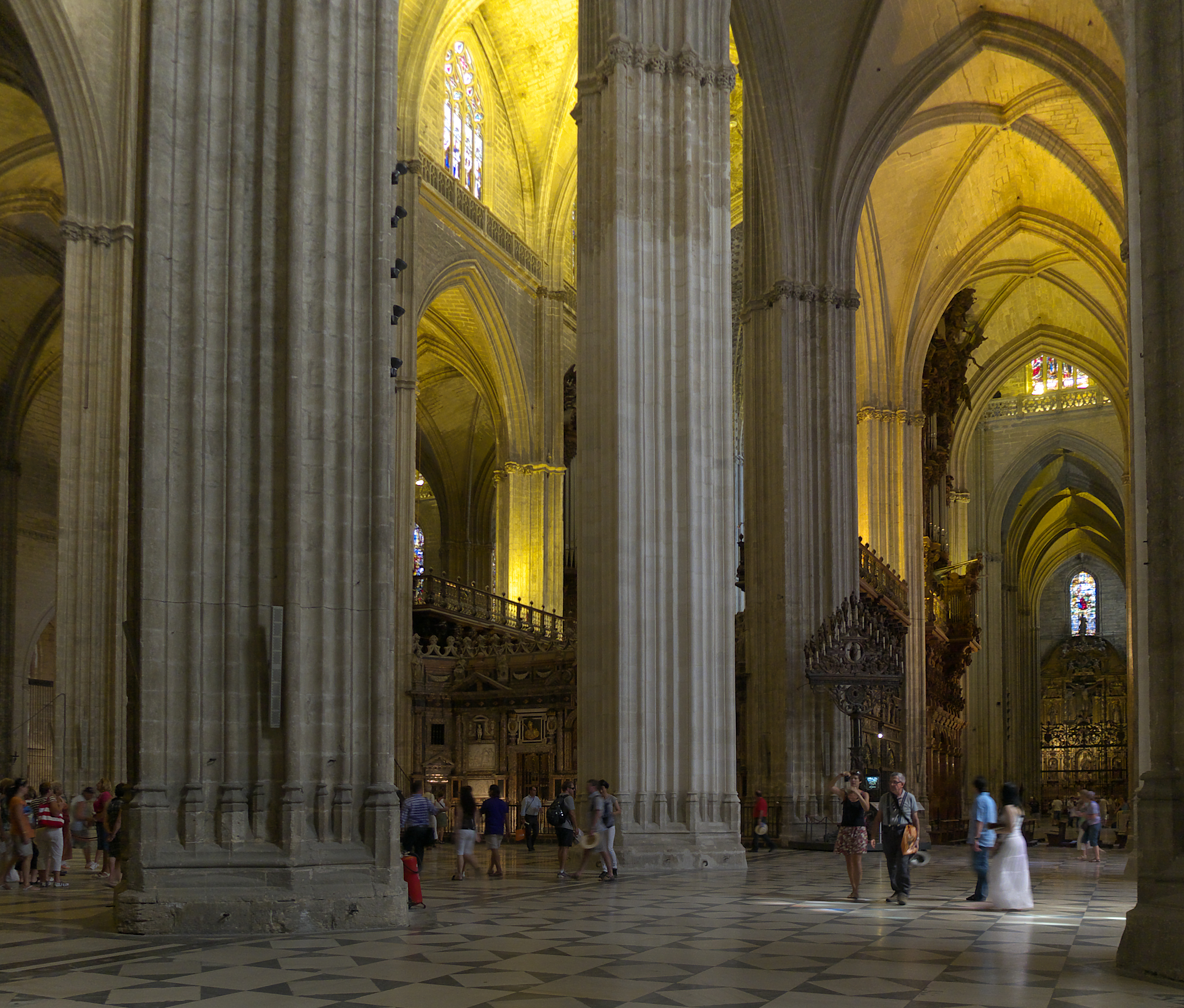 Once mil metros cuadrados, un sueño imposible, de arte en la catedral que Inocencio IV la tituló Santa María de la Sede.